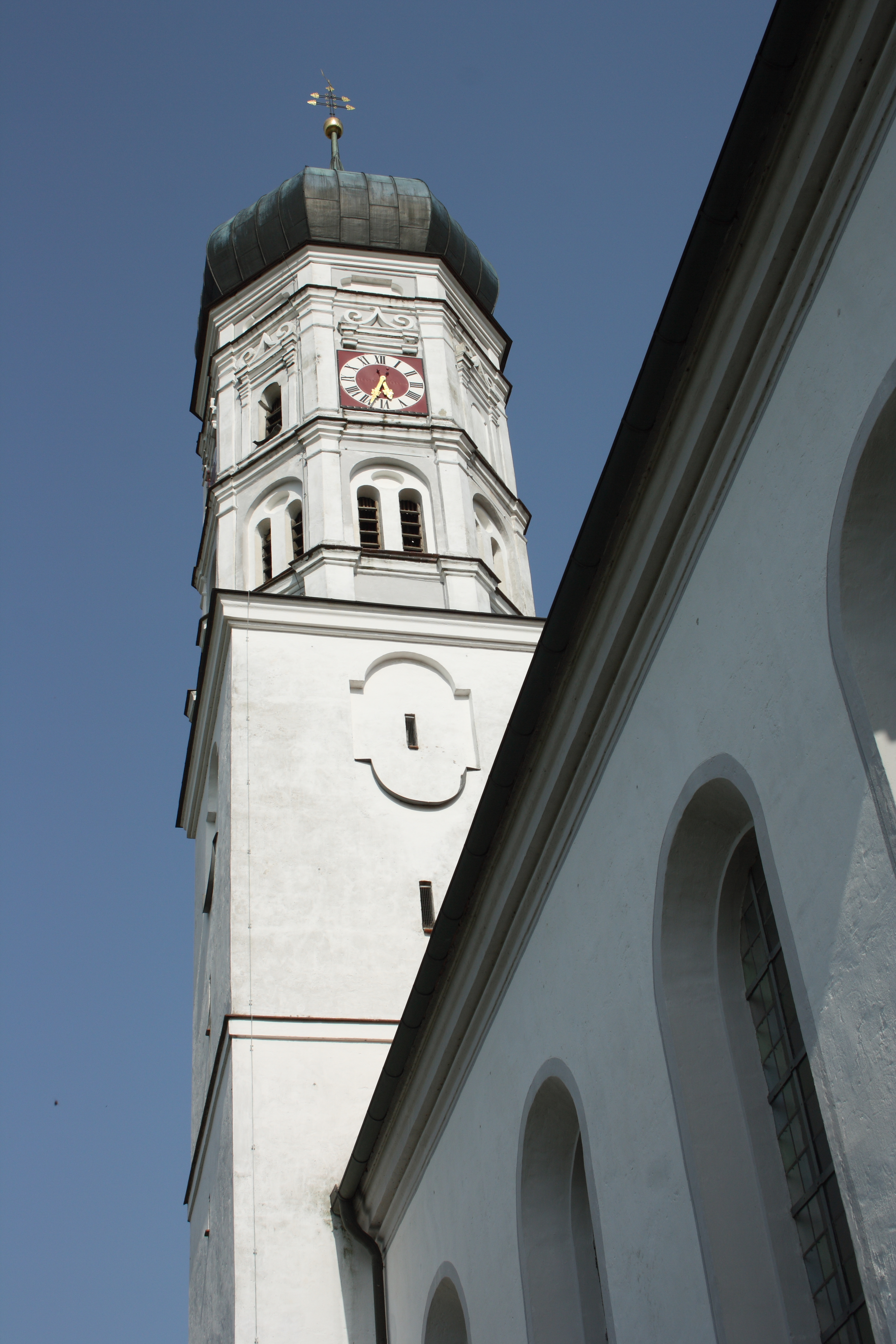 Katholische Pfarrkirche Mariä Himmelfahrt in Ettenbeuren, einem Ortsteil der Gemeinde Kammeltal im Landkreis Günzburg (Bayern), Turm mit oktogonalem Aufbau und Zwiebelhaube